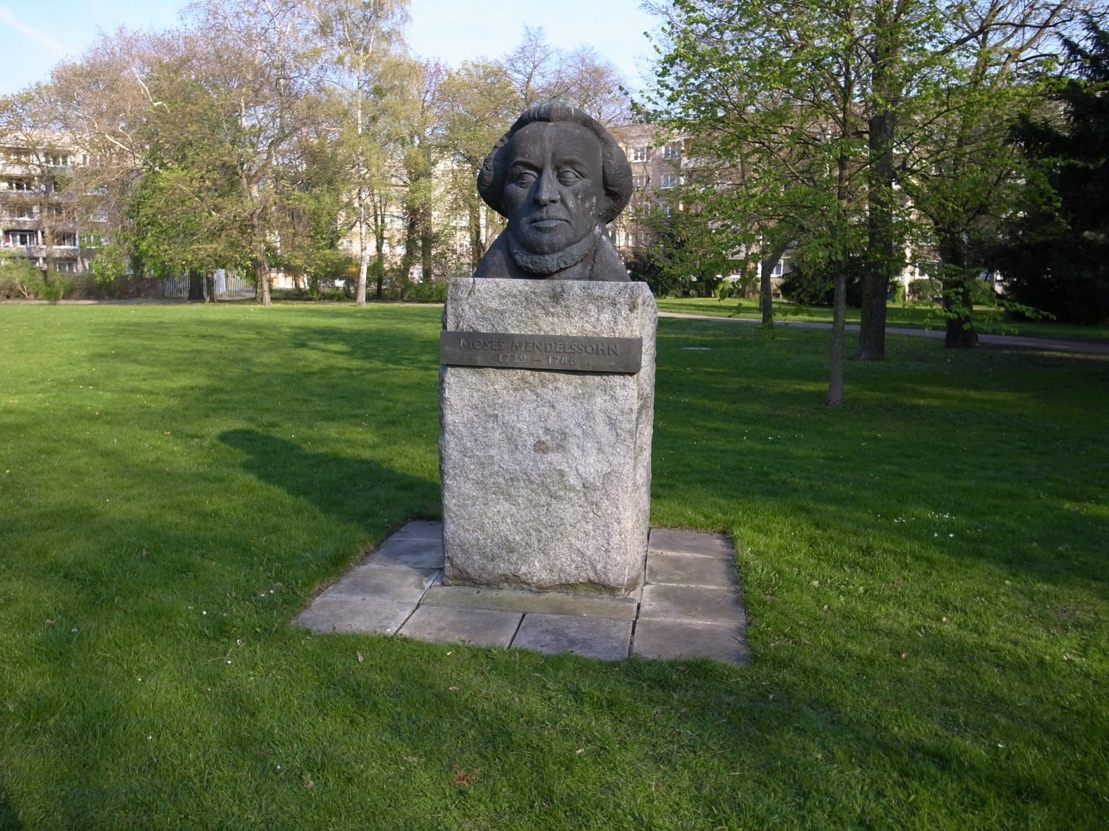 Moses Mendelssohn, Büste im Stadtpark von Dessau